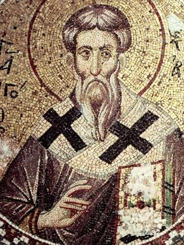 Описание изображения: Сщмч. Григорий. Мозаика. Паммакаристос (Фетхие Джами). Константинополь. Начало XIV в.